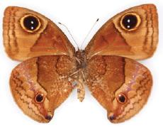 Calisto zangis